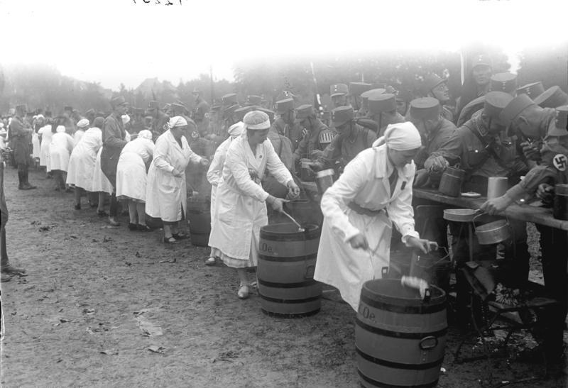 Der grosse Hitlertag in Gera! Feldmässige Verpflegung durch Samariterschwestern nach dem Feldgottesdienst in Gera